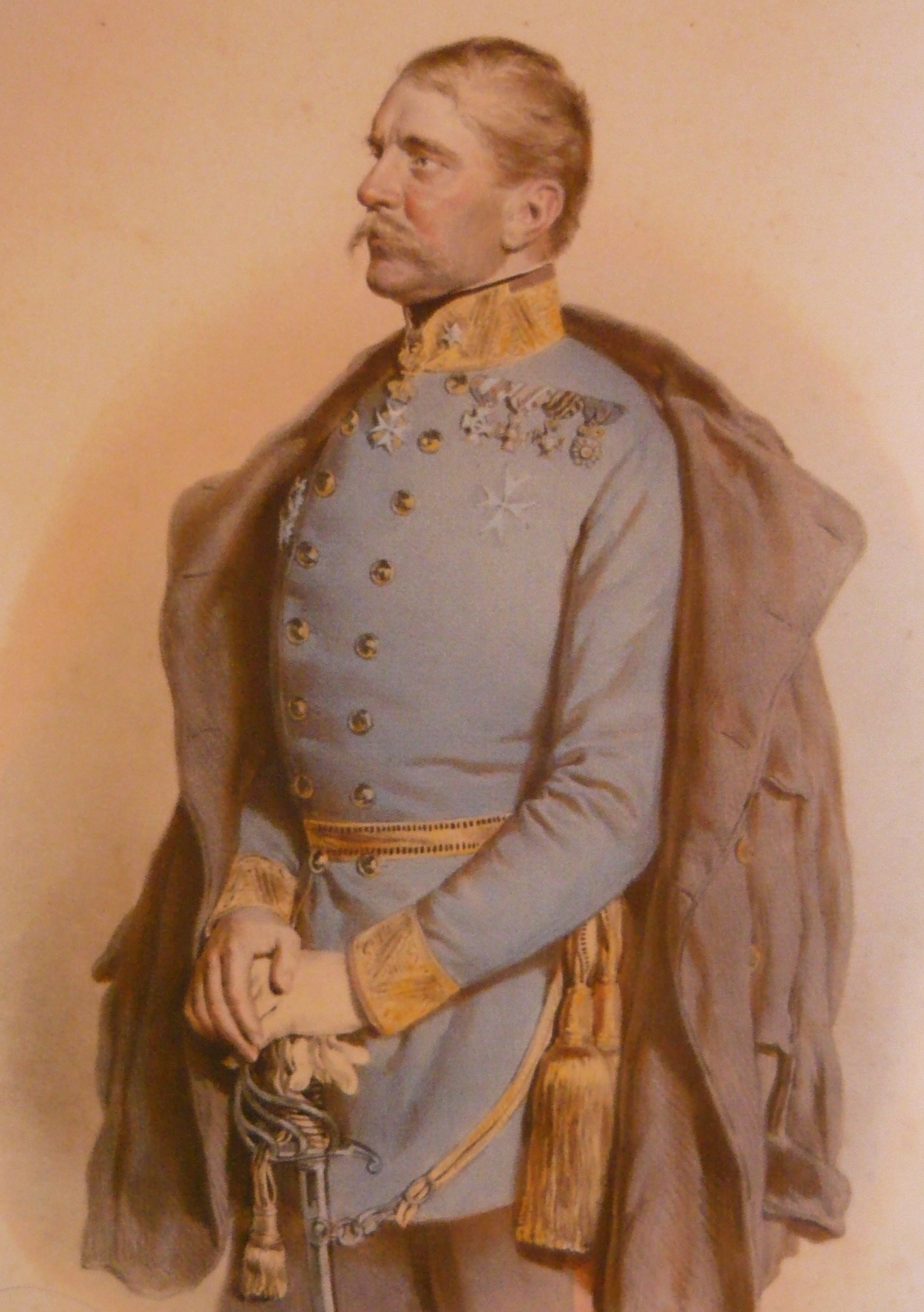 Sigismund Reischach